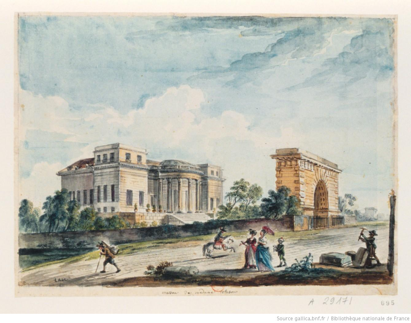 Hôtel Thellusson avec son entrée triomphale